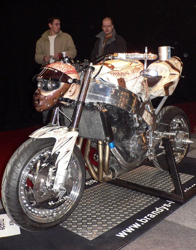 Streetfighter